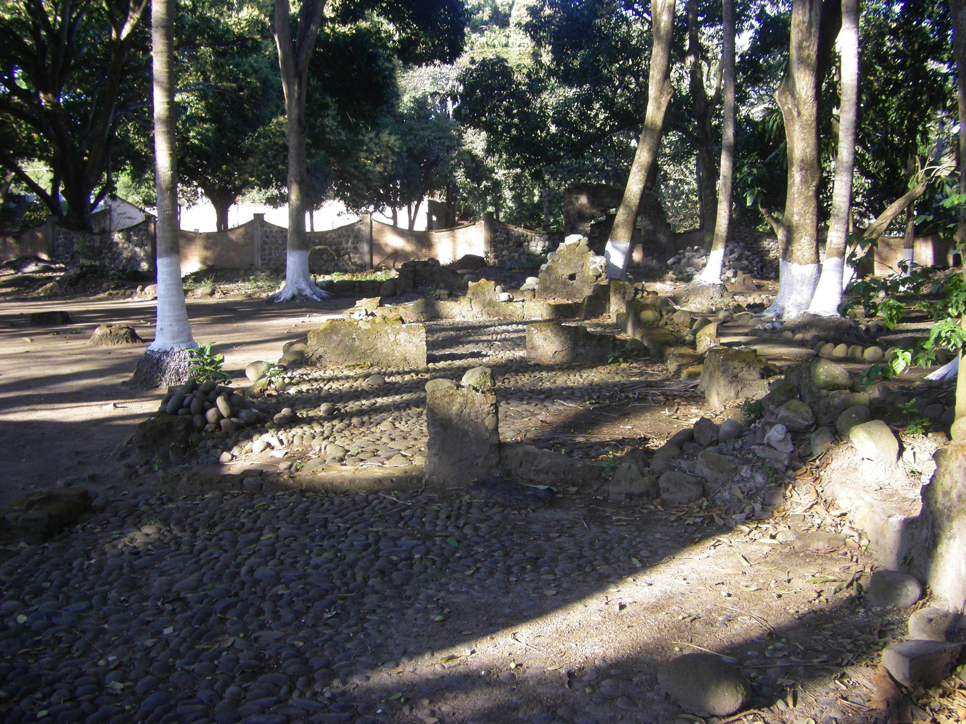 Ruine des ehemaligen Hauses von Hernán Cortés in La Antigua Veracruz